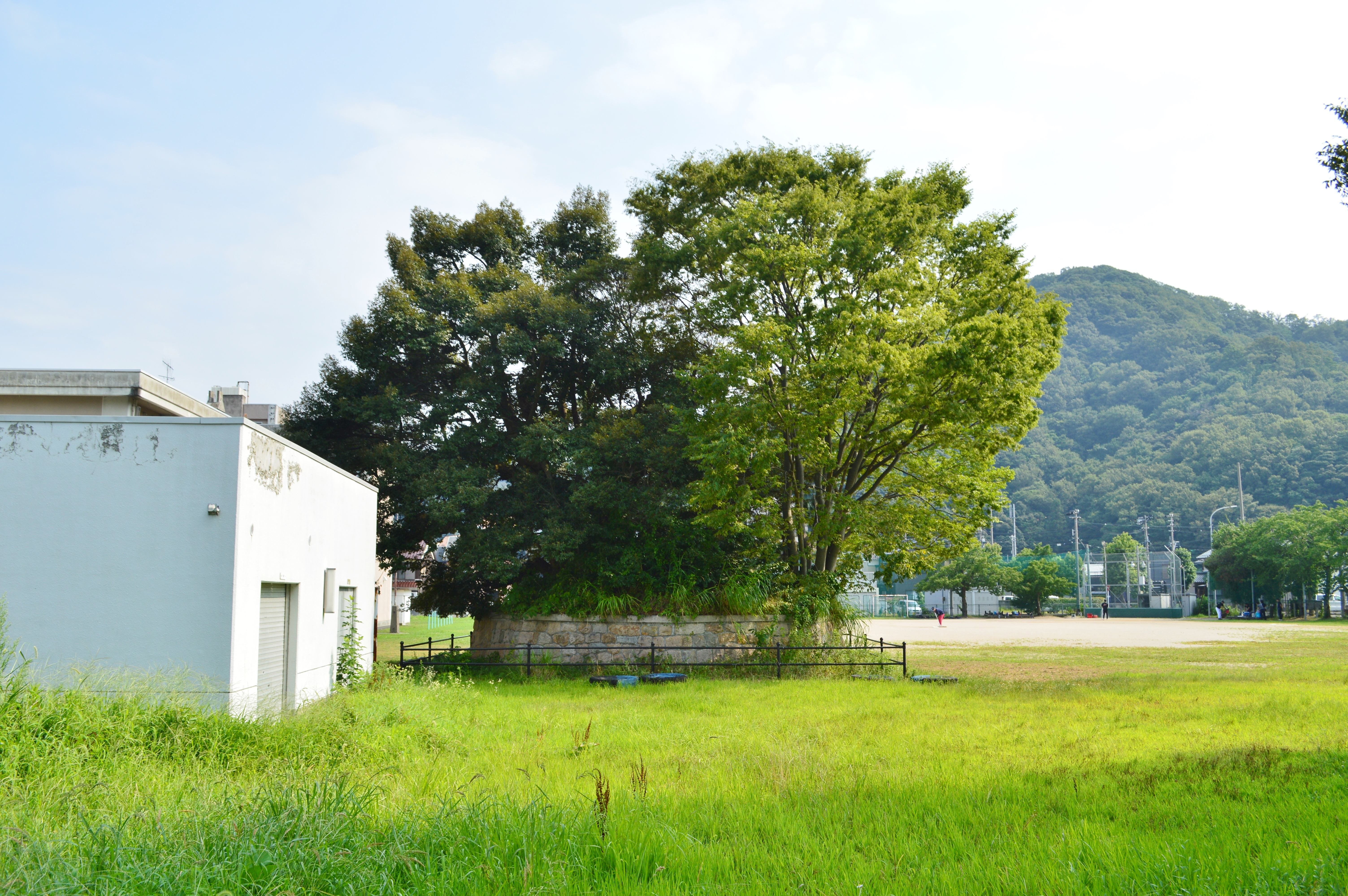 氣比神宮 土公